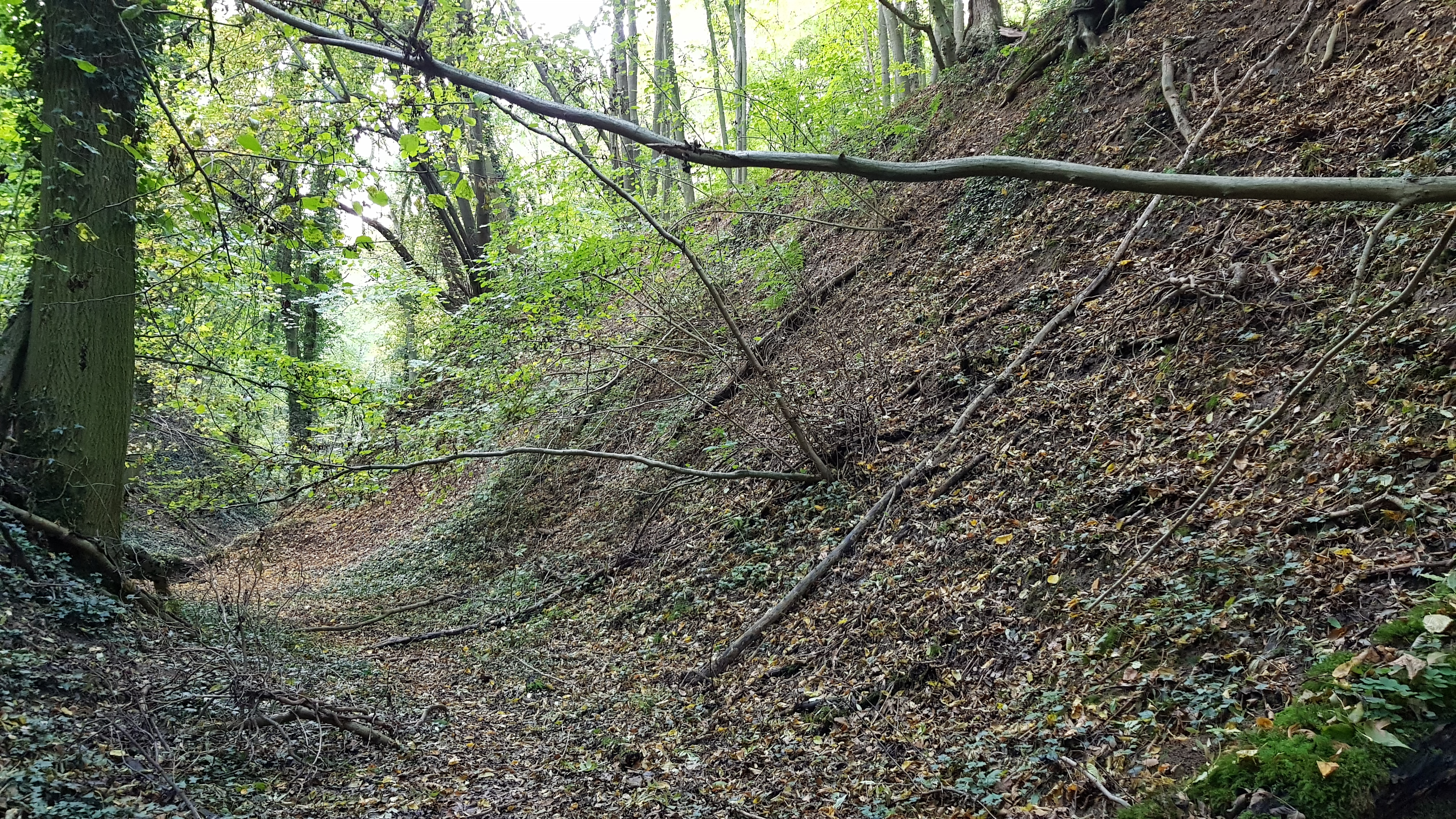 Schone Grub vuursteenmijntjes in het Savelsbos, Rijckholt, Nederland